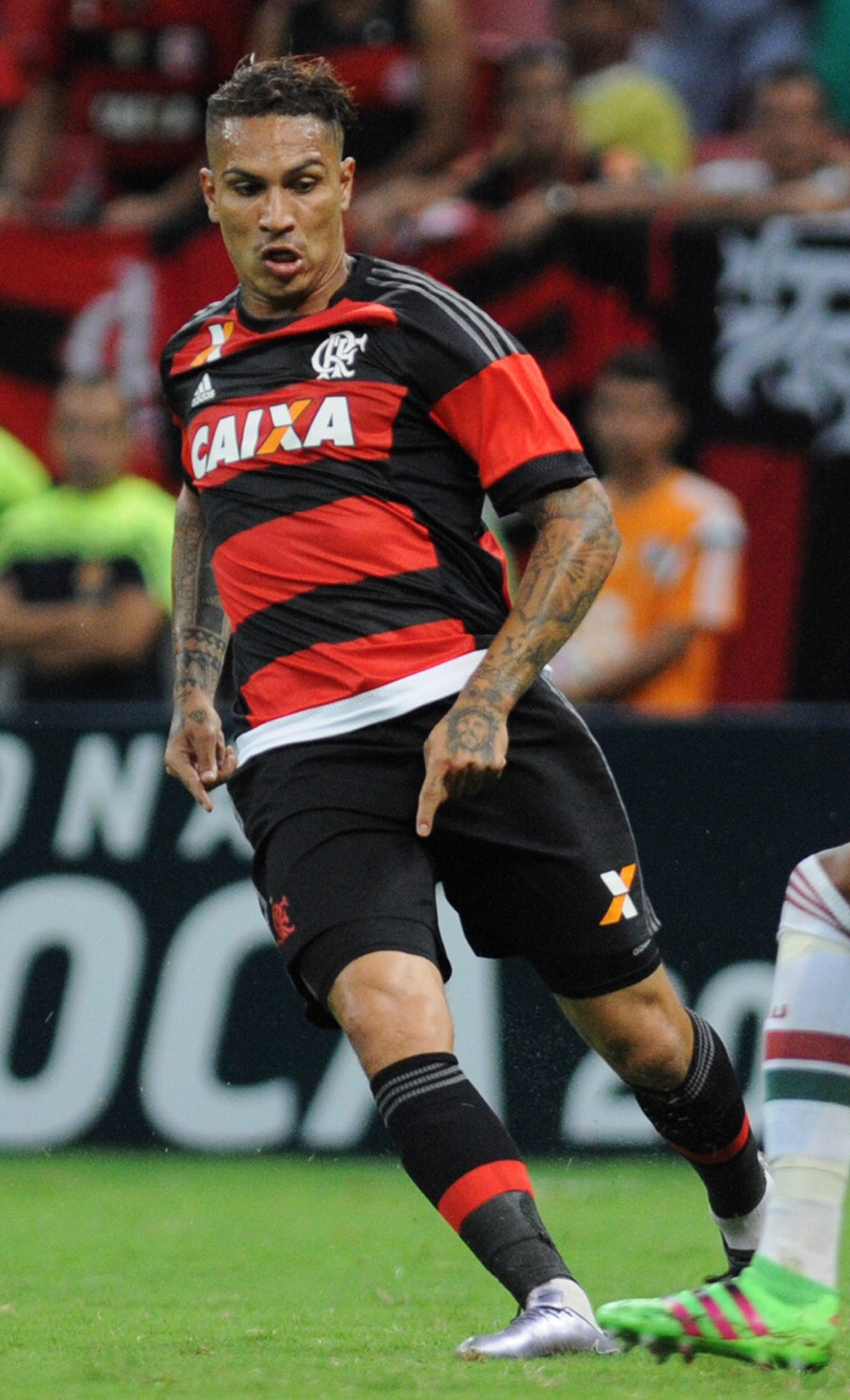 Estádio Mané Garrincha, Brasília, DF, Brasil 21/2/2016 Foto: Andre Borges/Agência Brasília Fluminense e Flamengo jogam neste domingo (21) pela quinta rodada do Campeonato Carioca no Estádio Mané Garrincha. A partida terminou com vitória do Flamengo sobre o Fluminense por 2 a 1.